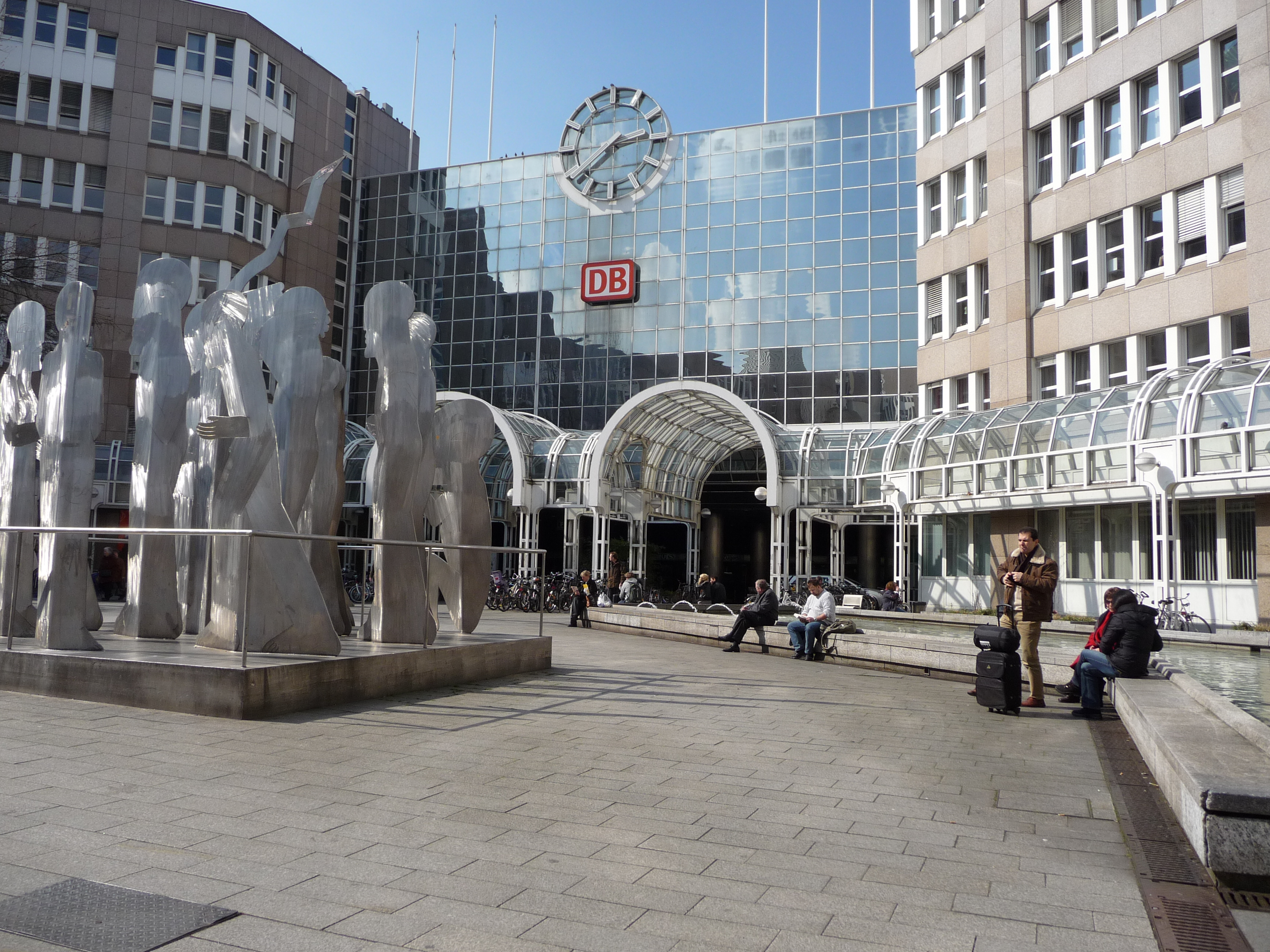 Düsseldorf, Bertha-von-Suttner-Platz mit Blick auf den Eingang des Hauptbahnhofs. Skulptur von Horst Antes.